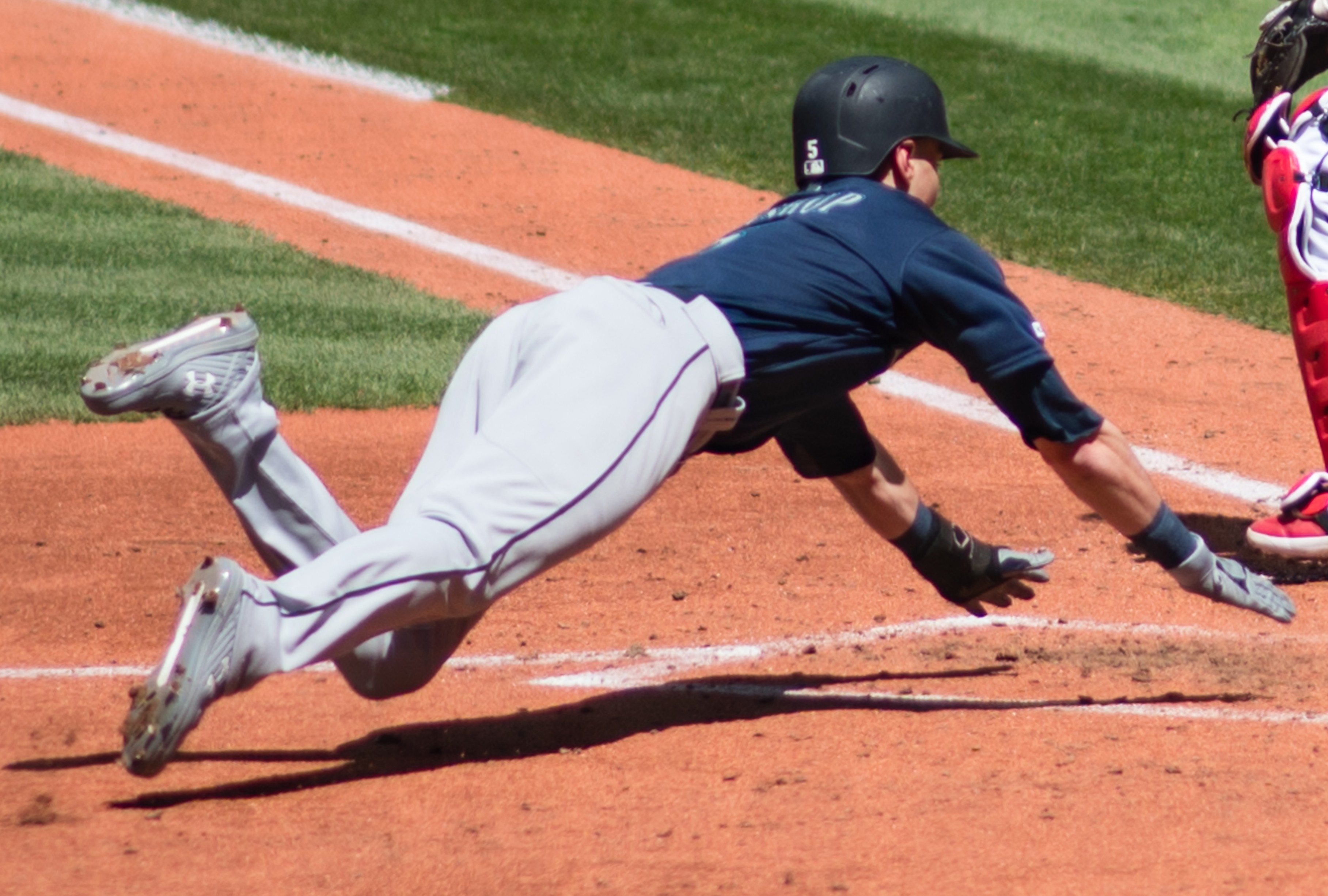 Seattle Mariners VS. Cleveland Indians